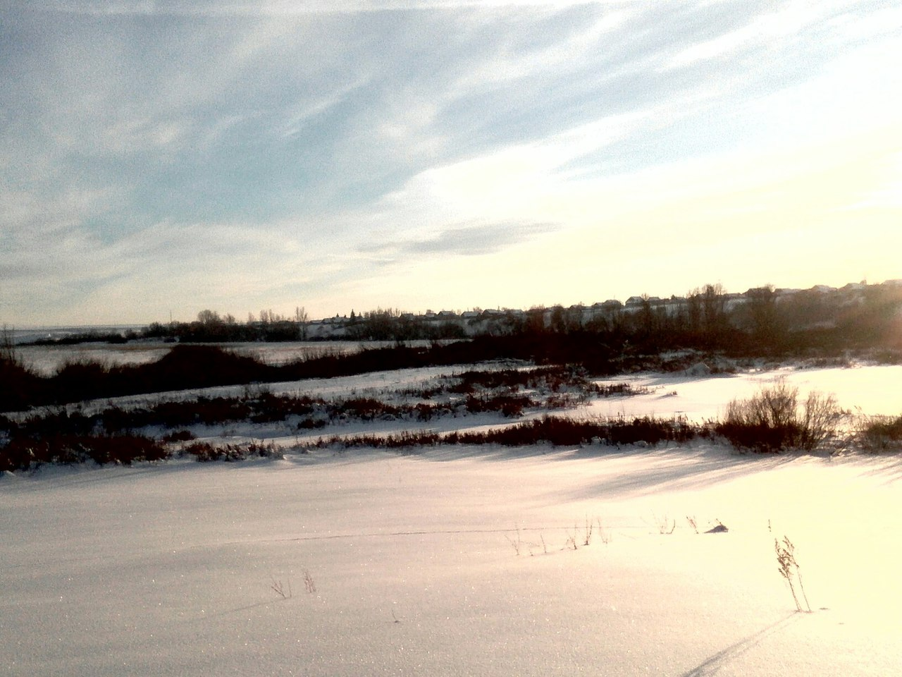 Красота села из далека.